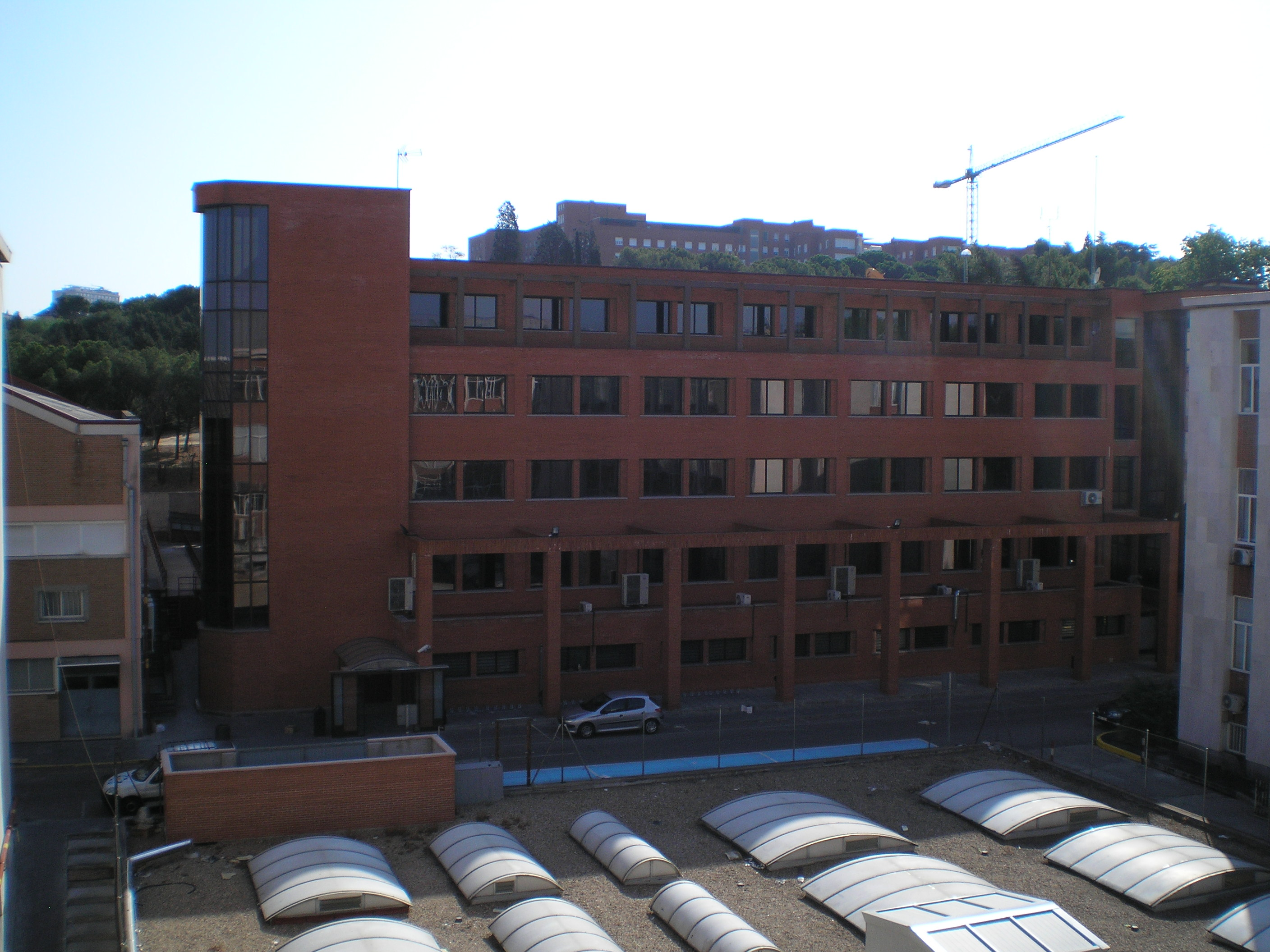 Escuela Universitaria de Ingeniería Técnica Aeronáutica, Universidad Politécnica de Madrid, España.